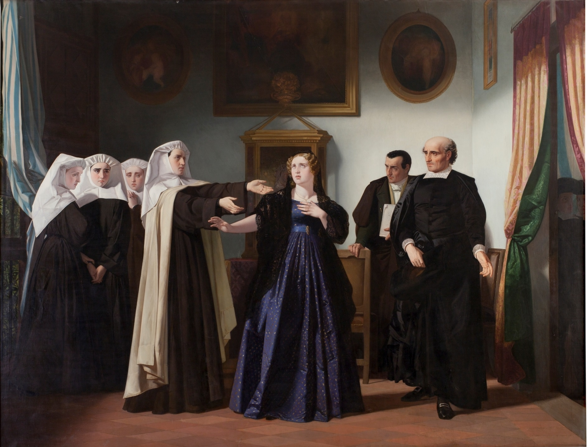 La obra representa a la heroína Mariana Pineda (1804-1831) en el en el momento de despedirse de las beatas de Santa María Egipciaca, en cuyo beaterio estaba presa, para ir a la capilla justo antes de su ajusticiamiento.